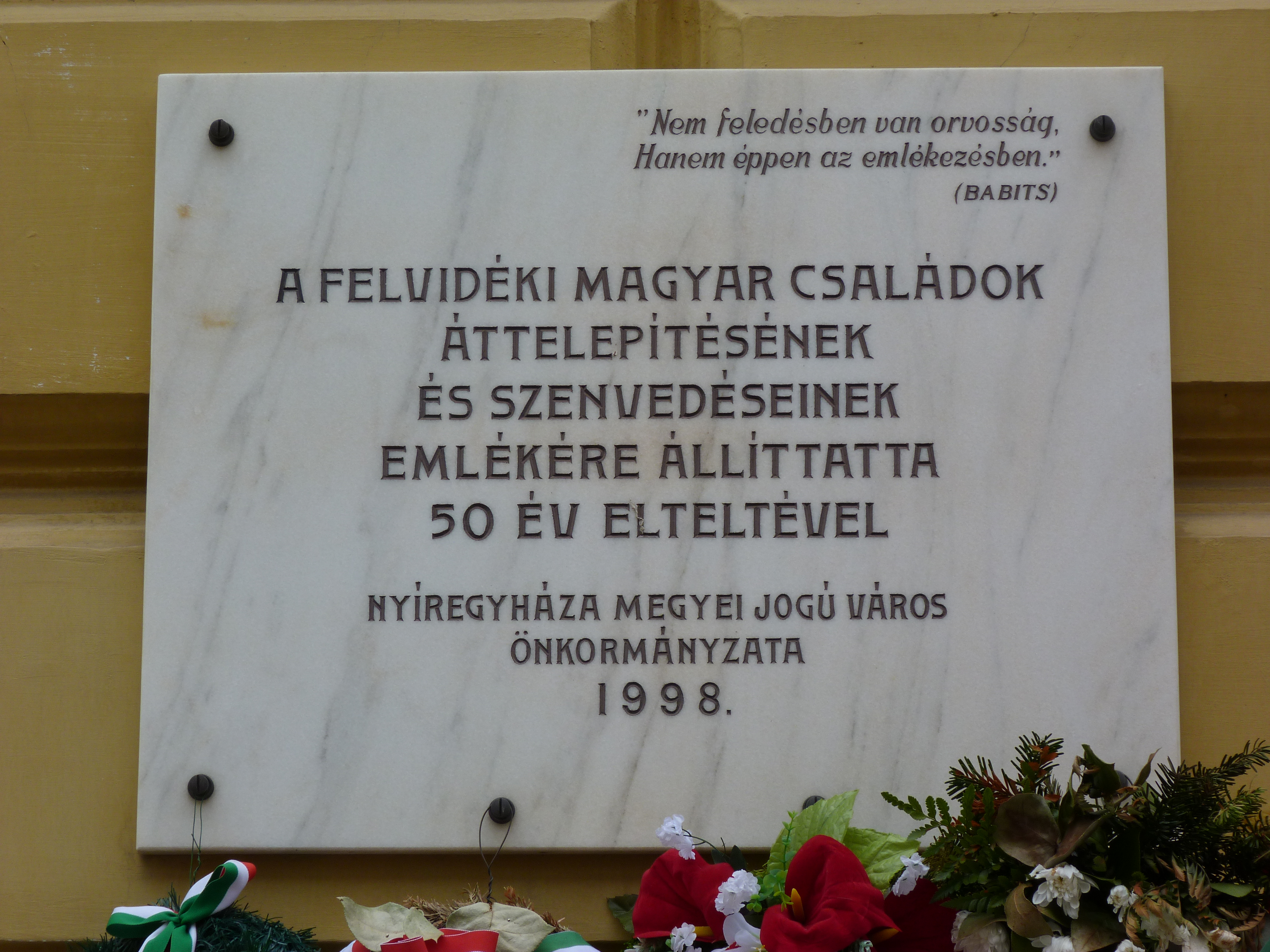 A felvétel 2013. Május 17 –én pénteken készült Nyíregyházán. ©© Derzsi Elekes Andor, Budapest, 2013, A kép és filmfelvételek egészben, vagy részletekben másolását, bármilyen úton történő sokszorosítását és felhasználását a szerző ellenérték nélkül, jogutódjaira is kihatóan megengedi. Az engedély kiterjed a kereskedelmi célú hasznosításra is. Kéri azonban nevének feltüntetését a felhasználás során. A Metapolisz sorozat valamennyi képe és filmje Creative Commons alatti valamint kereskedelmi - for profit - célra is felhasználható. Ajánlott hivatkozás: Derzsi Elekes Andor: Metapolisz DVD line